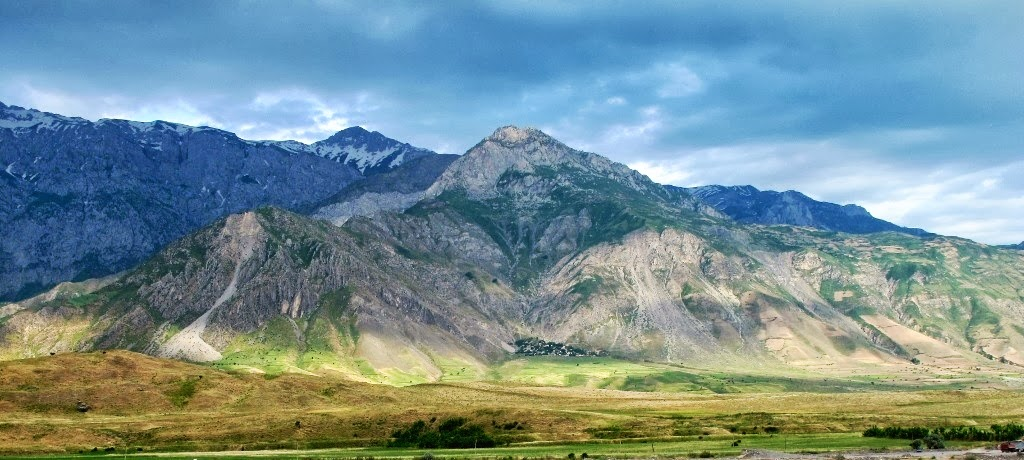 نمای از خواهان و محله شاهون شورآباد